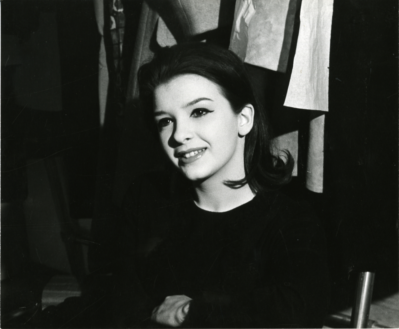 Servizio fotografico : Italia, 1965 / Paolo Monti. - Stampe: 10 : Positivo b/n, gelatina bromuro d'argento/ carta, 24x30. - ((Sul coperchio della scatola, manoscritto a pennarello: "Ritratti femminili"